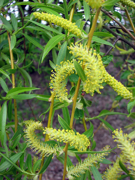 Ива